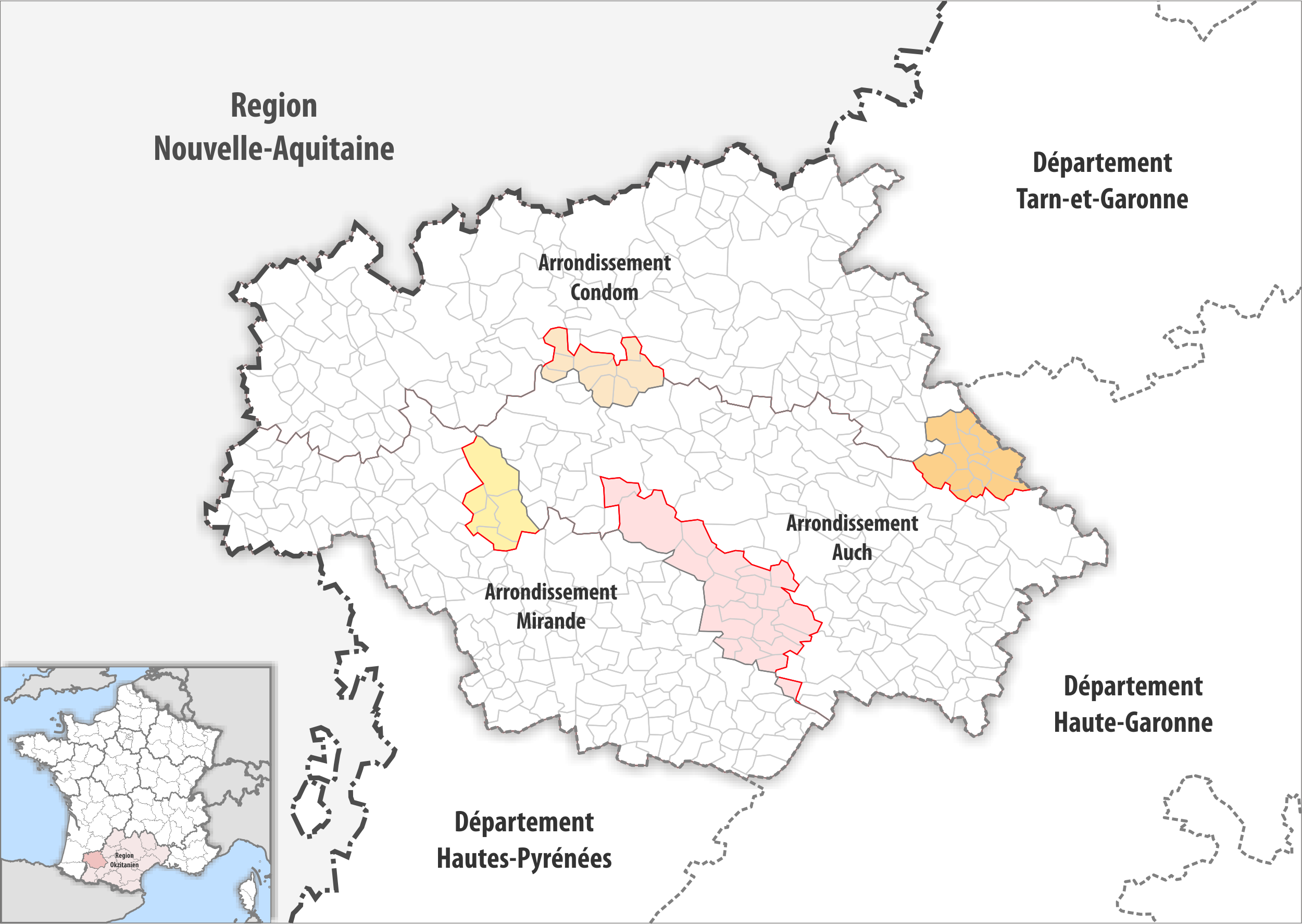 Arrondissements Anpassungen auf 2017 im Departement Gers